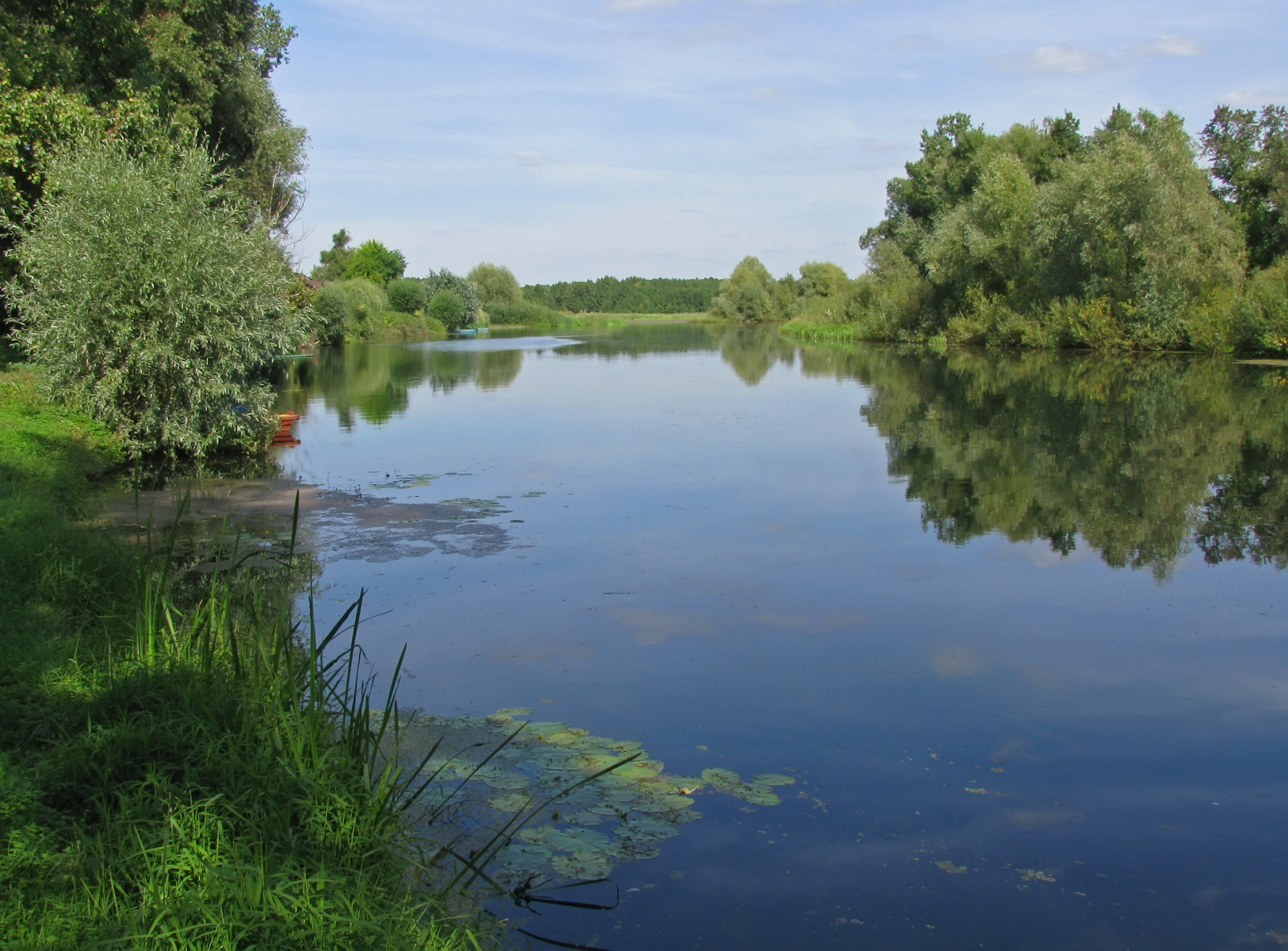 Лизогубівський (Седнівський) парк, Чернігівський район, смт. Седнів